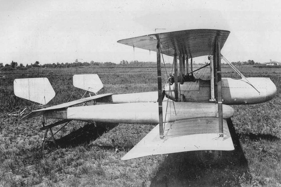 Caproni Ca.38 di profilo